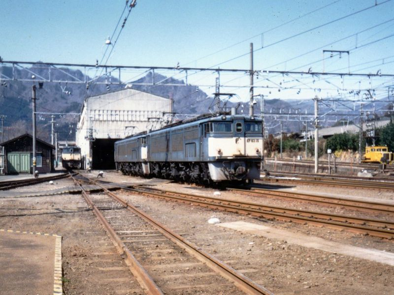 1988年ごろの東日本旅客鉄道横川運転区(許可を得て撮影)